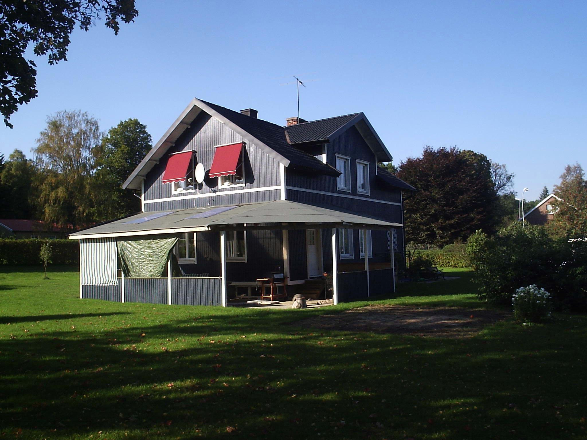 Bilden är fotograferad av Harri Blomberg. Photo by Harri Blomberg.